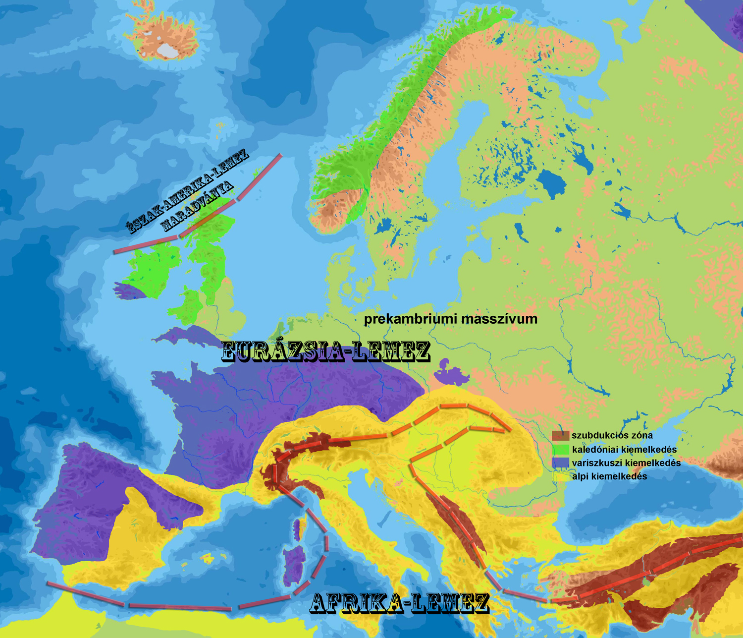 Európa geológiai nagyszerkezeti térképe.